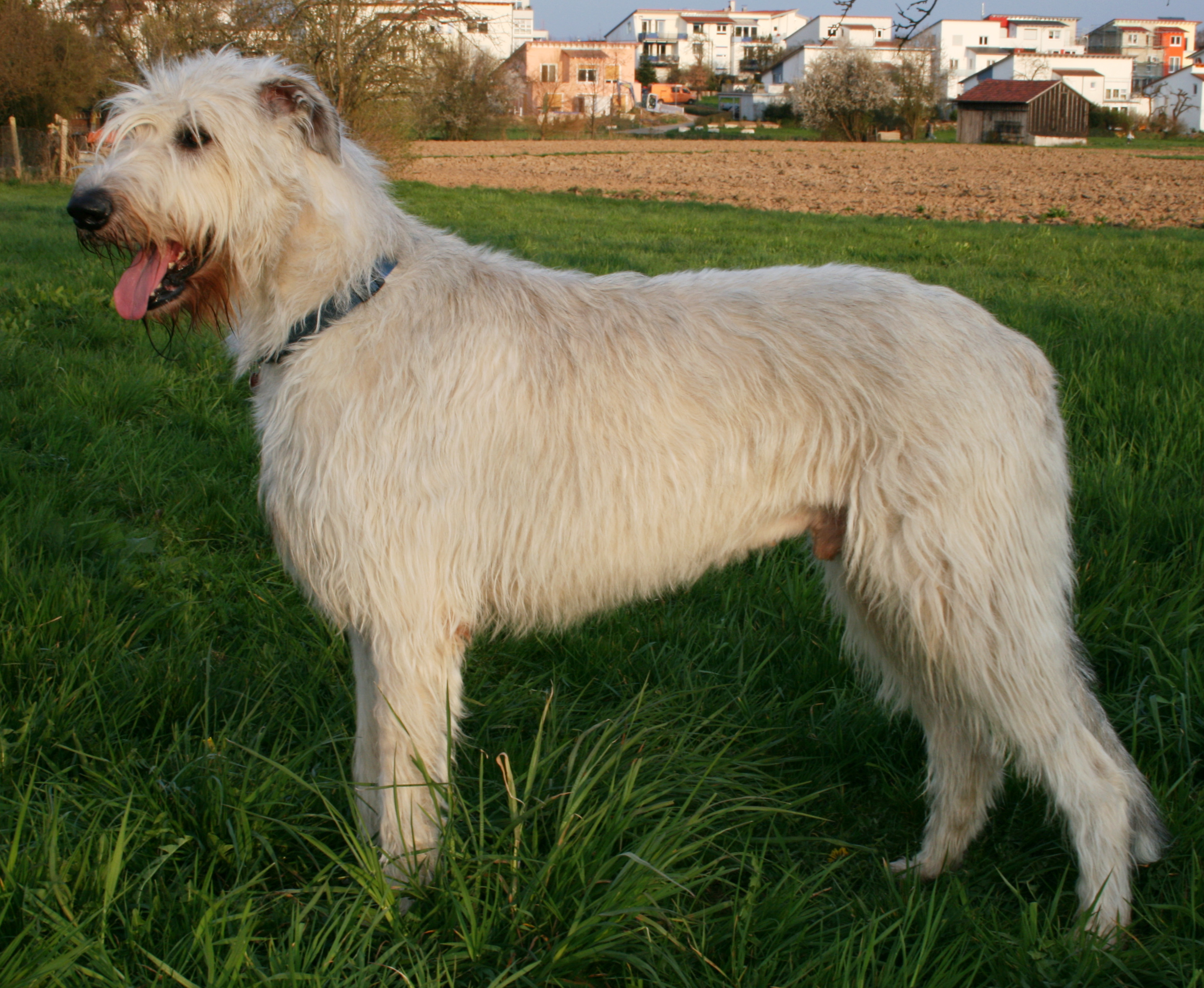 Irish Wolfhound Rüde